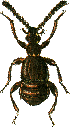 This file has been extracted from another file: Jacobs16.jpg